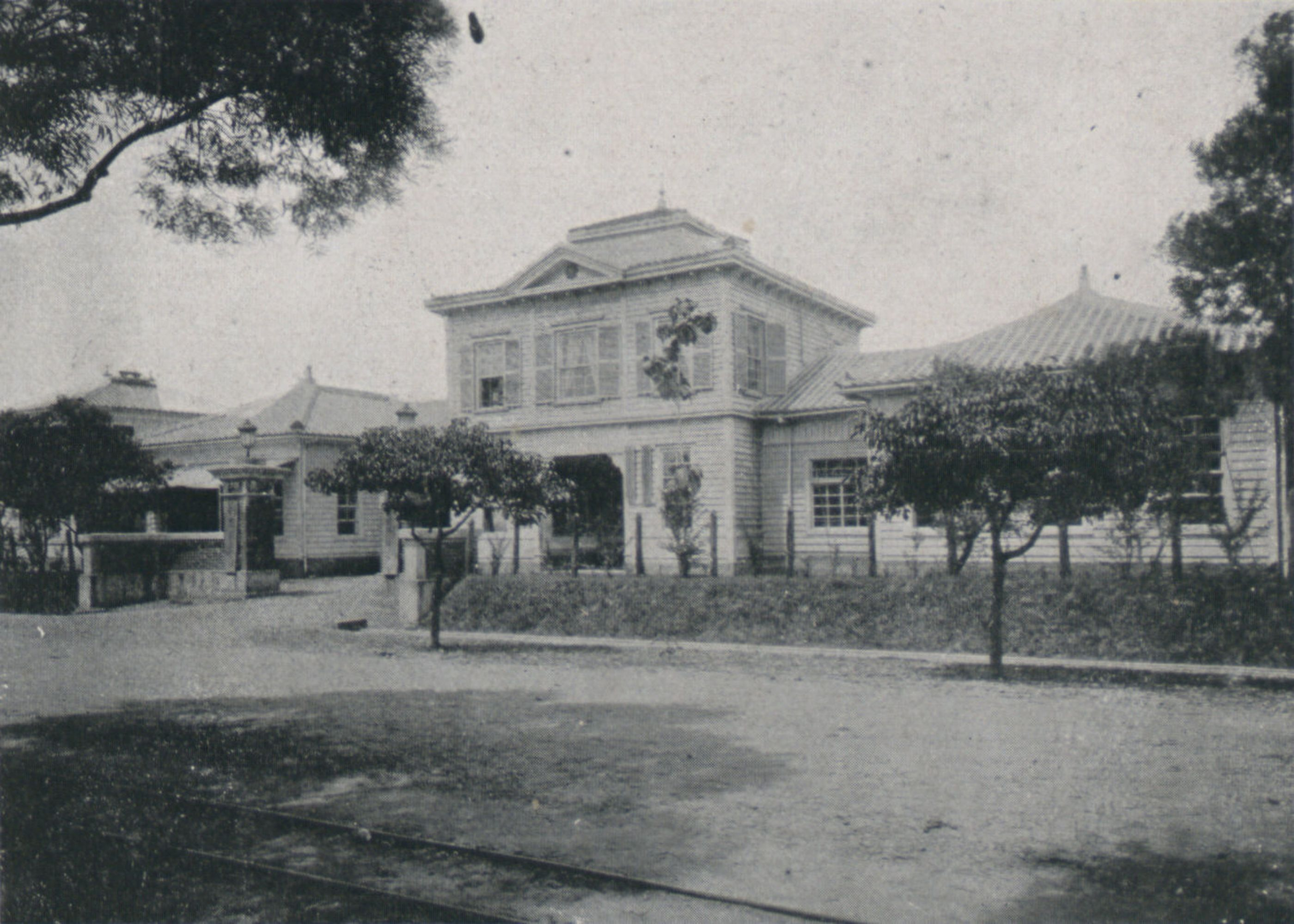 中文（台灣）: 舊桃園廳舍